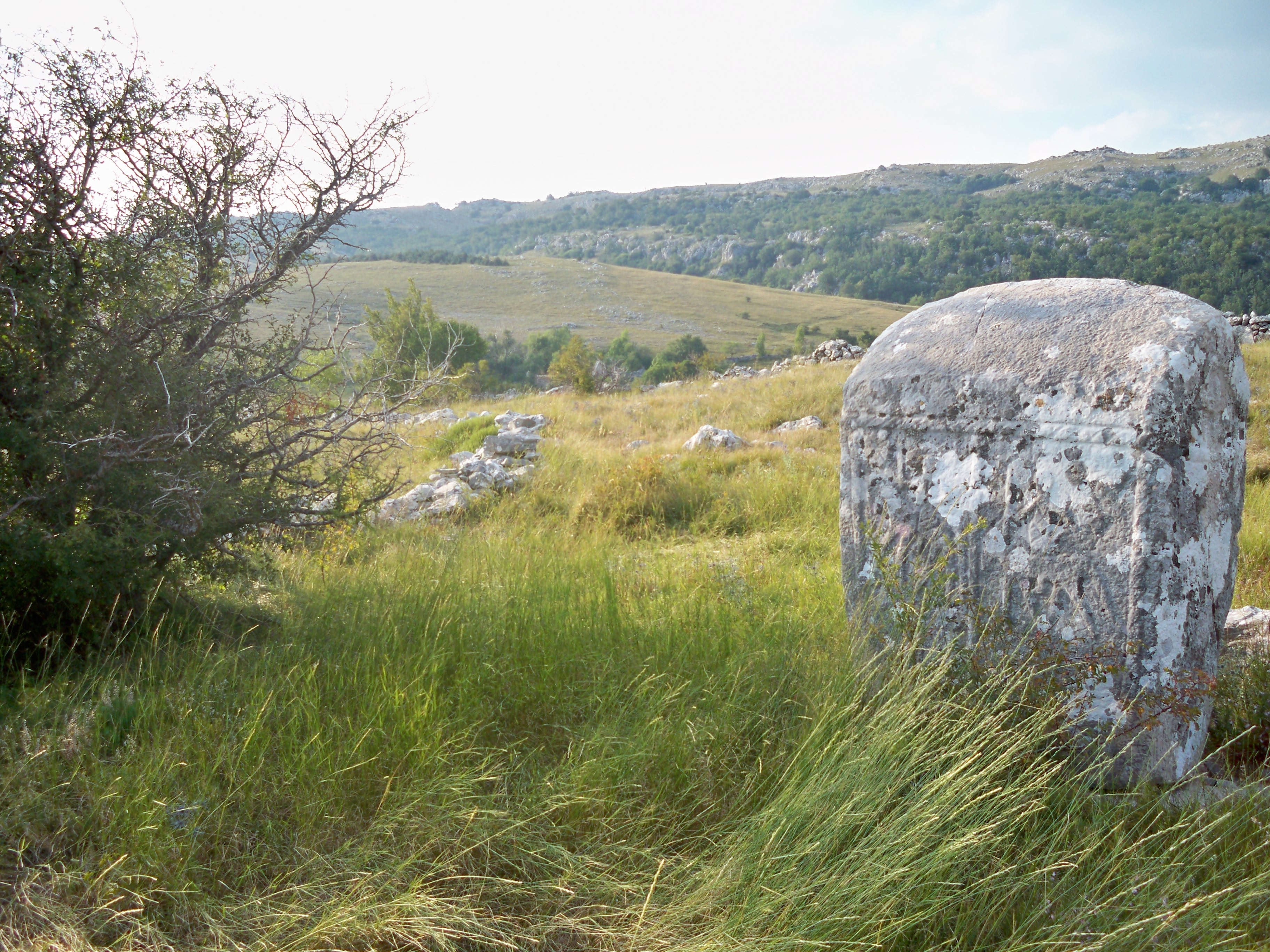 Stecci na gornjim Vostanima